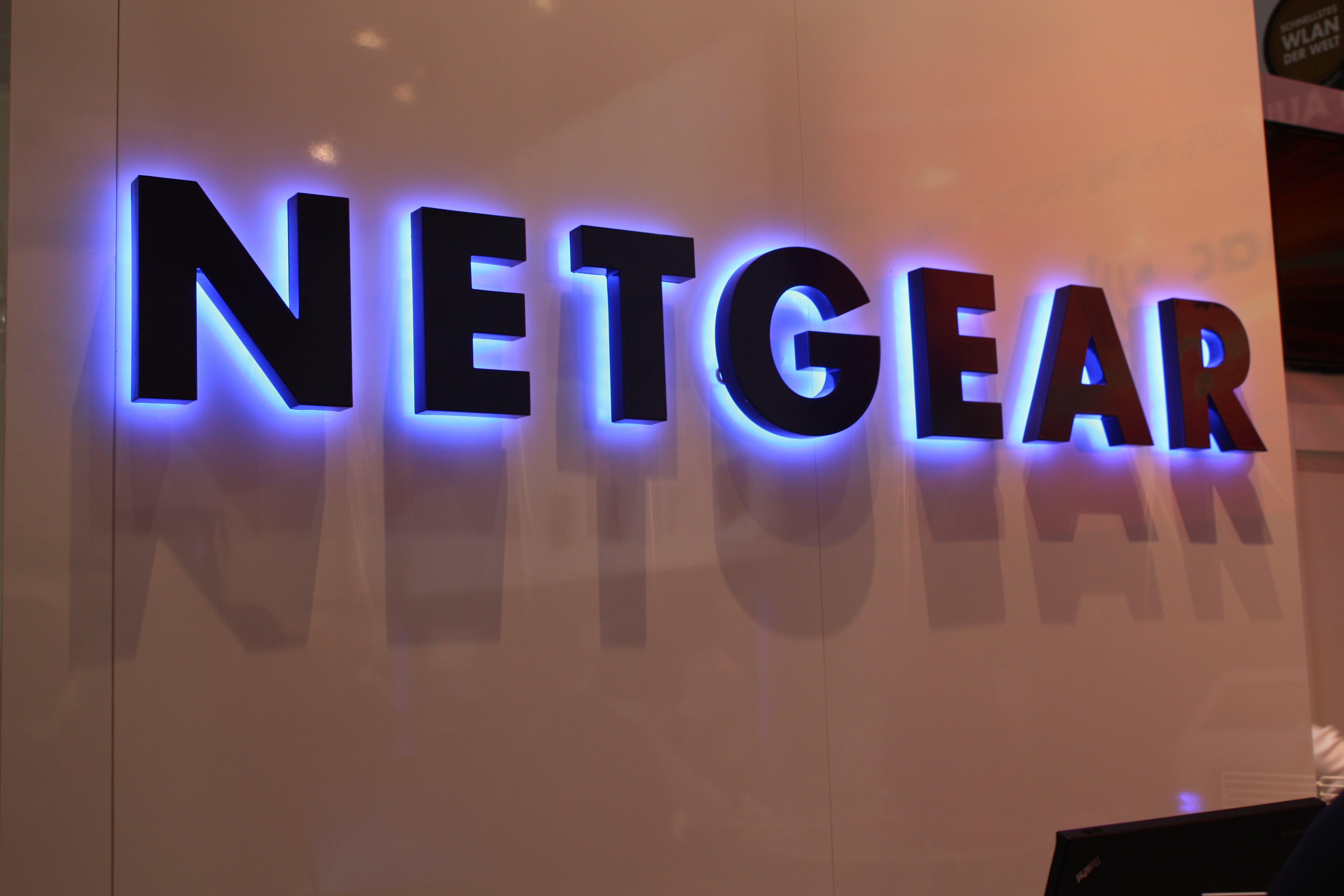 Internationale Funkausstellung 2012 , Netgear